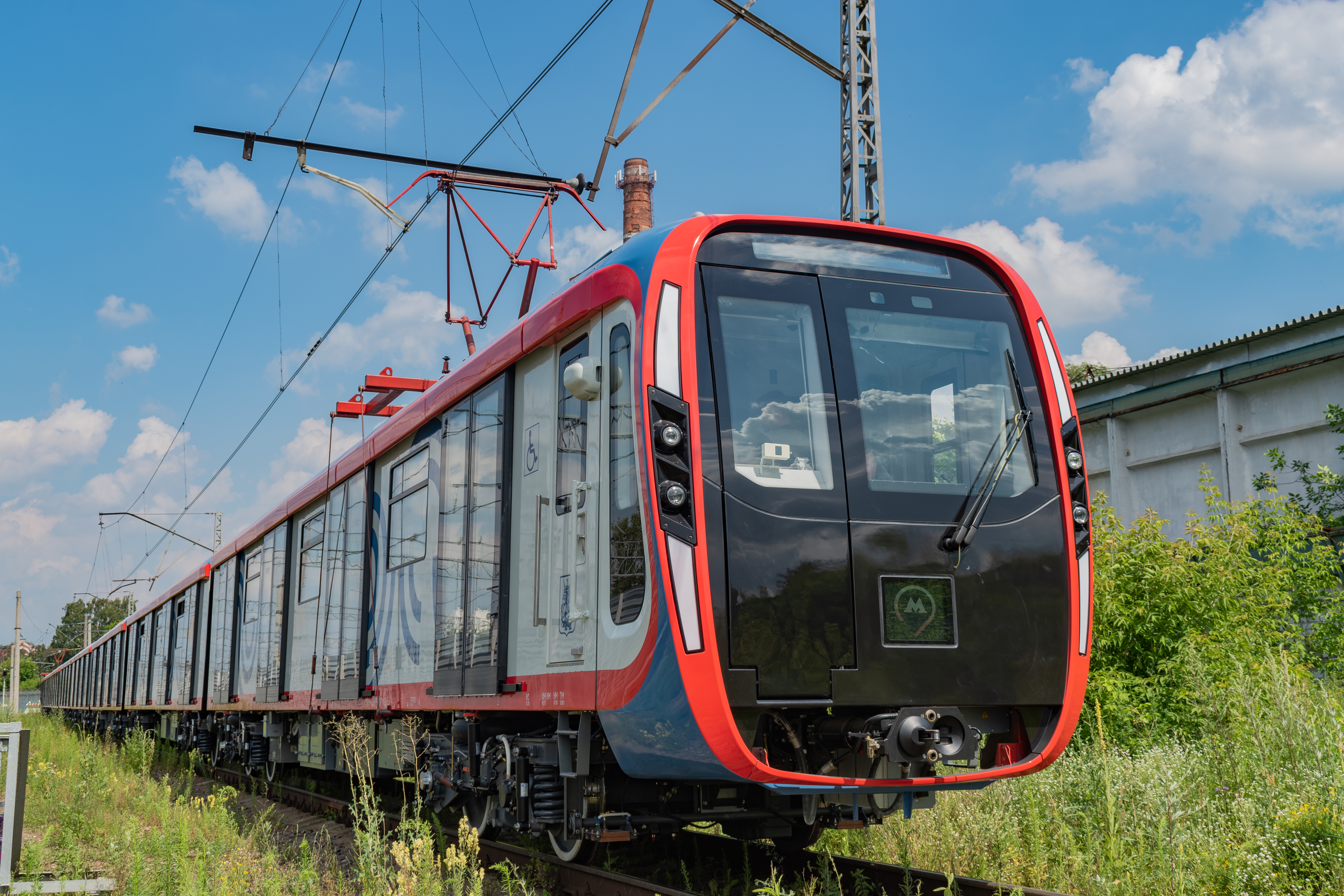 Заводская обкатка 81-775/776/777 в АО "Метровагонмаш", 12 июля 2020